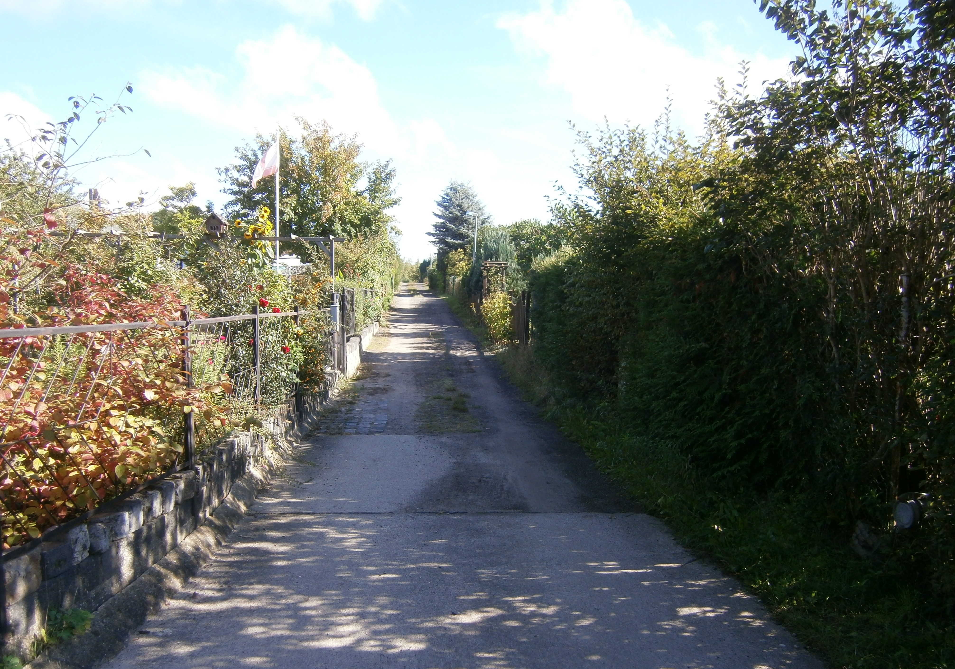 Der Höhenweg ist eine Privatstraße in Berlin-Blankenfelde und ist als Fahrweg in der Kleingartenanlage KGA Arkenberge vorhanden. Hier der Blick von der Hauptstraße nach Nordost.